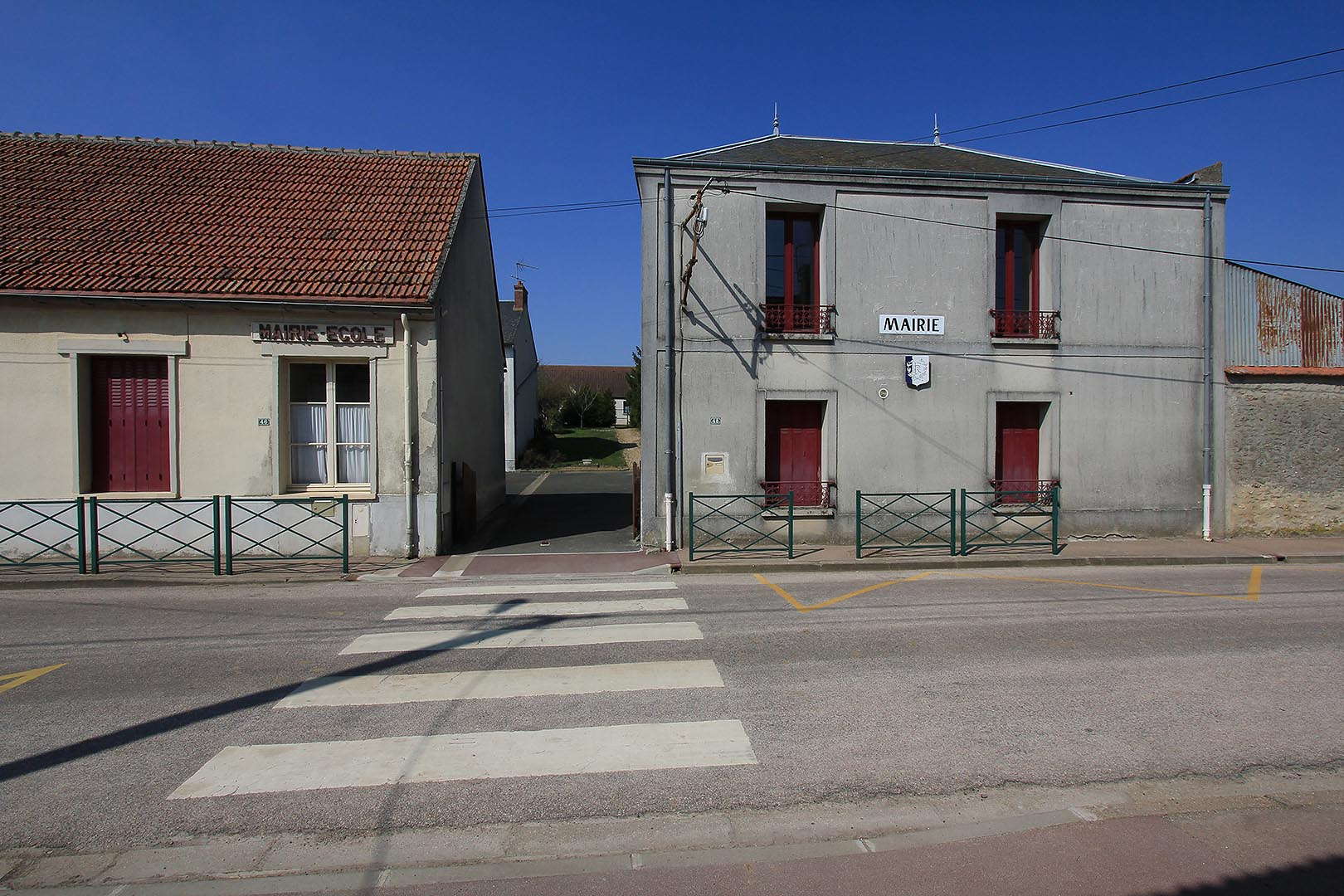 Mairie de Marolles en Beauce